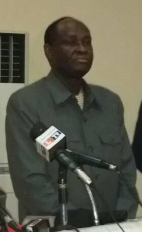 Tiebile Drame, président du Parti pour la renaissance nationale (Parena, opposition) à Bamako, Mali, 25 avril 2018. (VOA/Kassim Traoré)